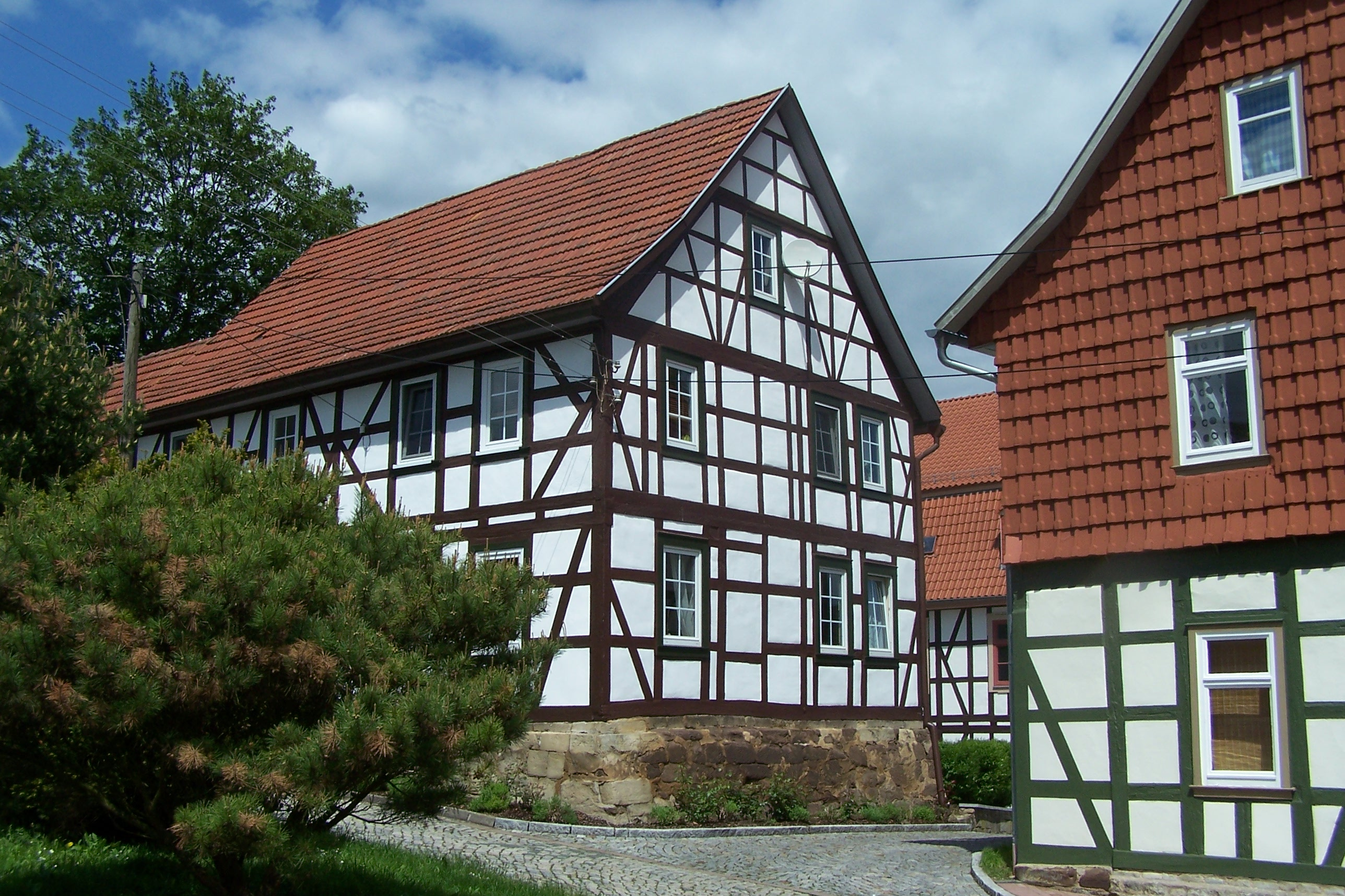 Ansichten und Details zum Schloss Bischofroda im Wartburgkreis.